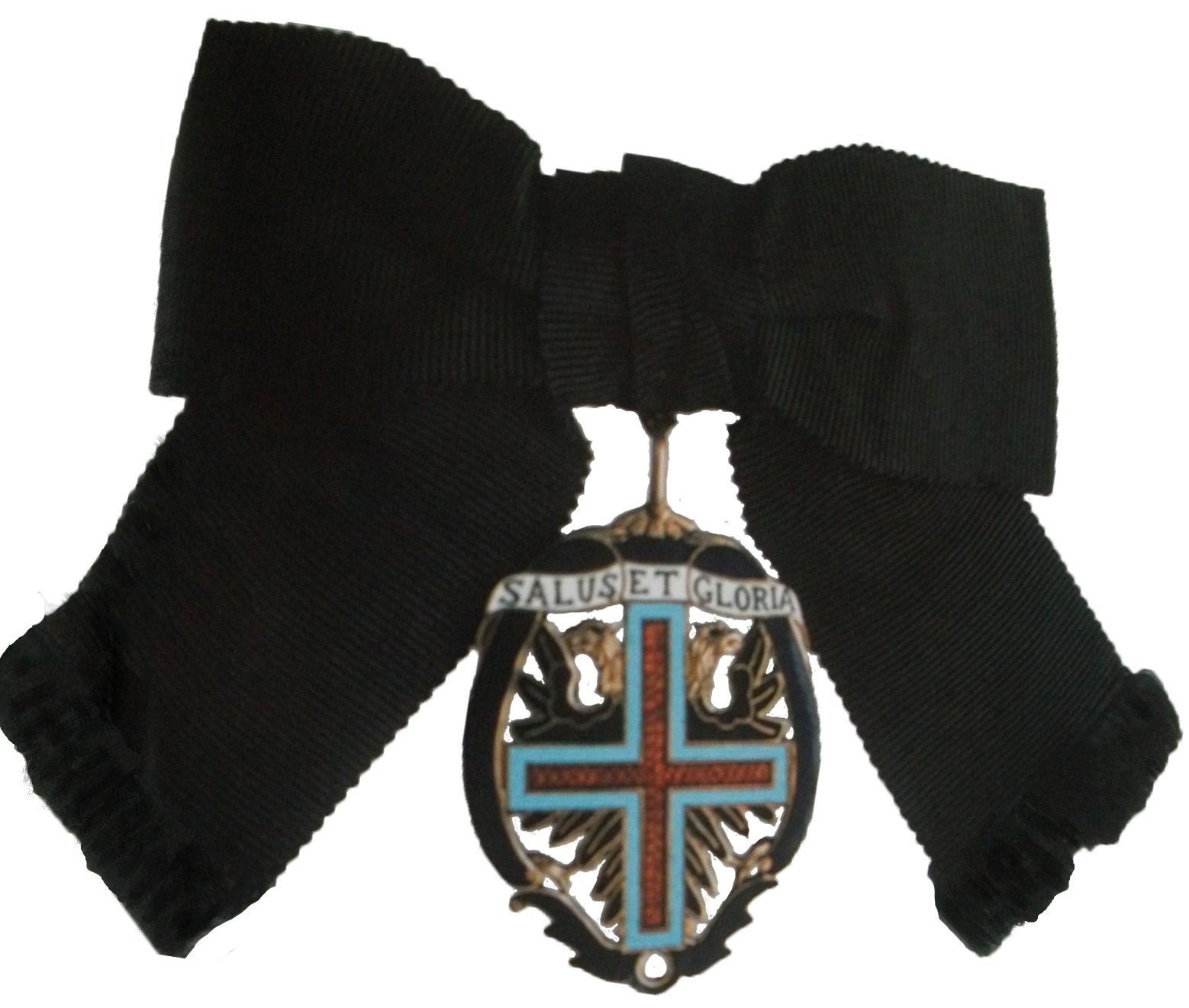 Ordre autrichien de la Croix Noble Croix-étoilée qui a porté de nombreux noms comme : ordre des Dames Chevalières de la Croix du Rédempteur ordre des Dames réunies pour honorer la Croix ordre des Chevalières de la Vraie Croix société des Dames Nobles de la Croix étoilée.